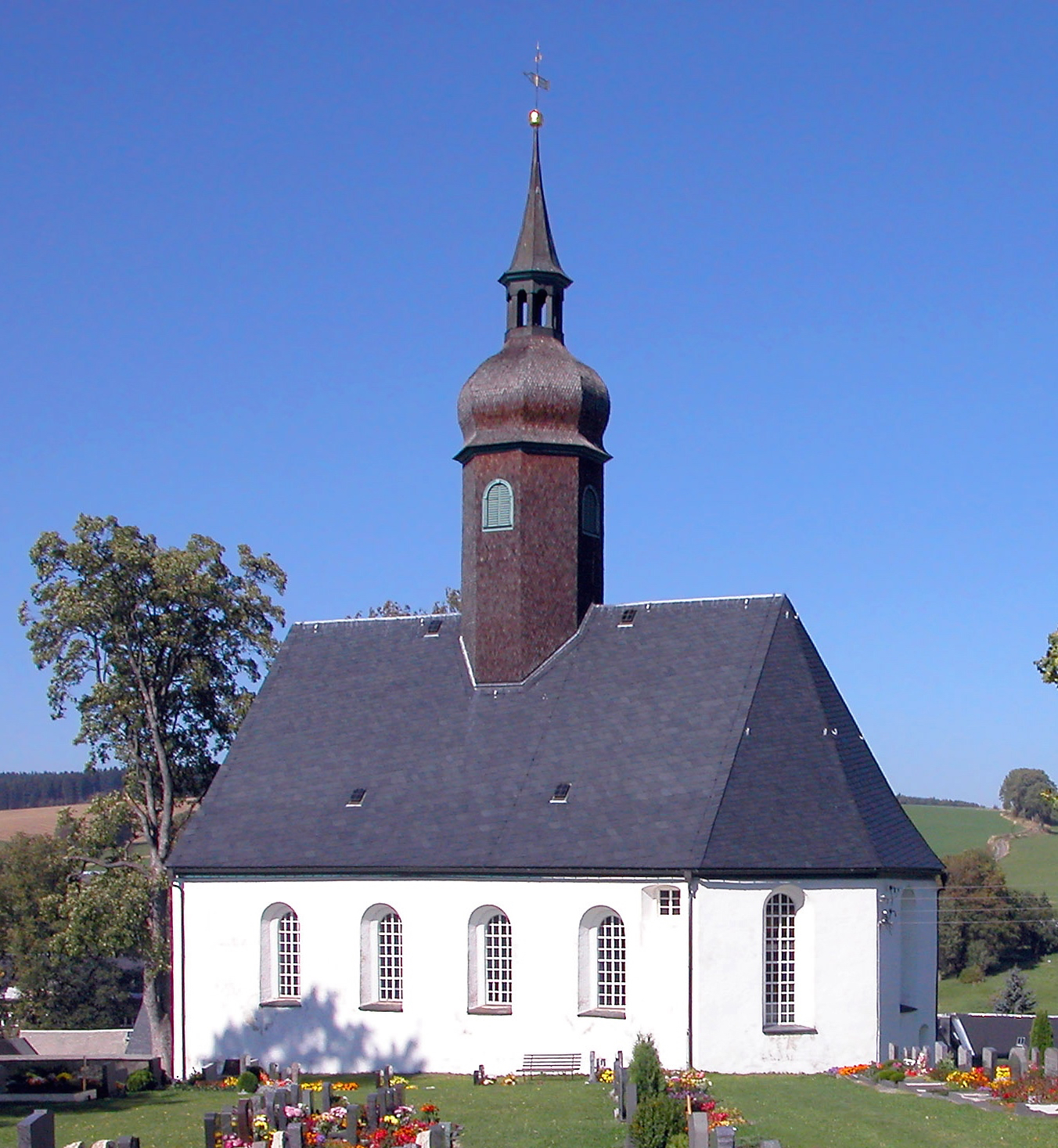 23.09.2006 09544 Cämmerswalde (Neuhausen/Erzgeb.): Dorfkirche (GMP: 50.709103,13.502754), Anfang 15 Jh., Umbau 1703-1708. [DSCN11513.TIF]20060923070DR.JPG(c)Blobelt